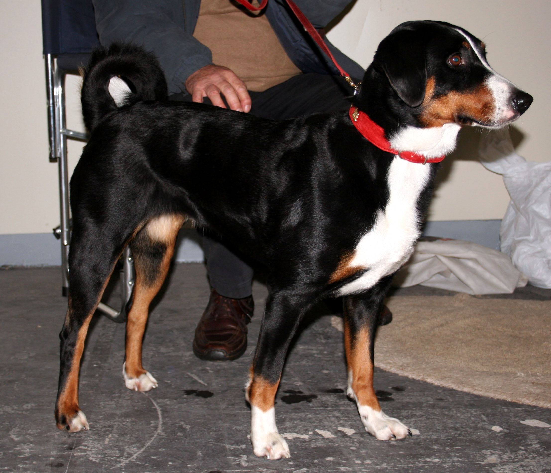 Appenzeller na Światowej Wystawie Psów Rasowych w Poznaniu